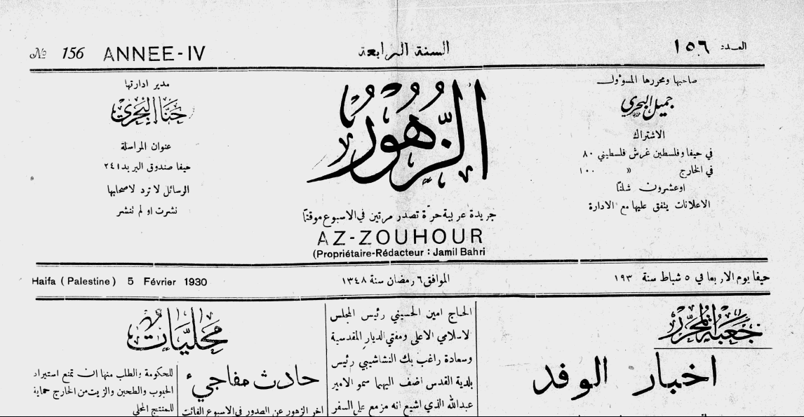 جريدة فلسطينية صدرت في حيفا خدمت الزهور مصالح طائفة الروم الكاثوليك في حيفا والجليل